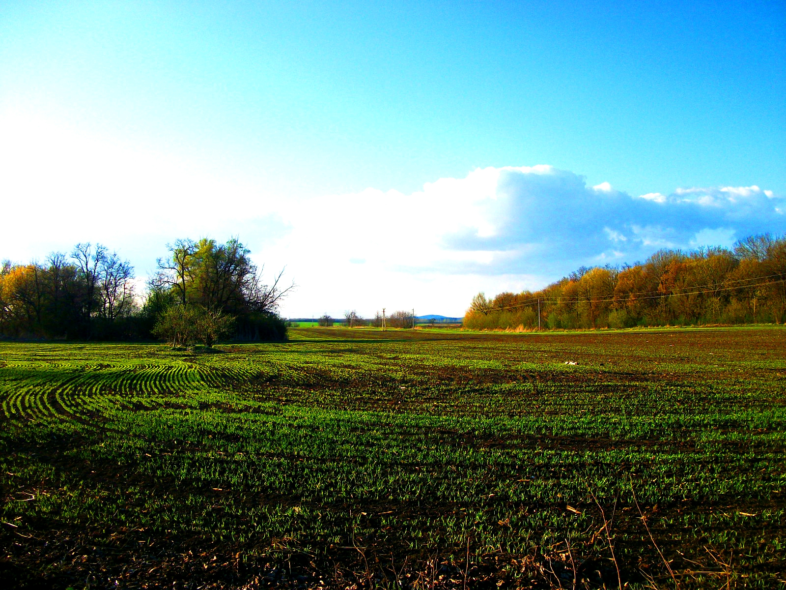 Szántóföld Zichyújfalu mellett, a távolban a Velencei-hegység vonulatai láthatóak.